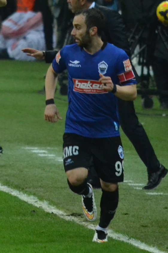 Cenk Ahmet Alkılıç